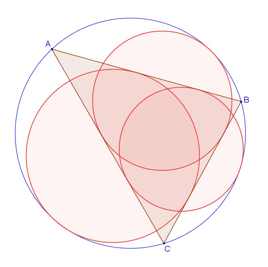 Полувписанные окружности Автор - Сапрыкин Евгений Федорович Скриншот свободно распространяемой среды GeoGebra